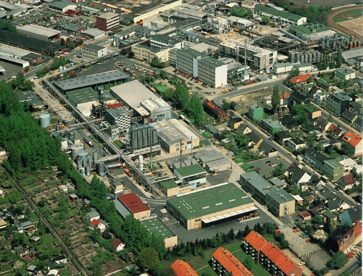 Luftaufnahme Hoechst Aktiengesellschaft, Werk Hamburg